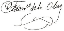 Firma de Francisco de la Obra Martinez